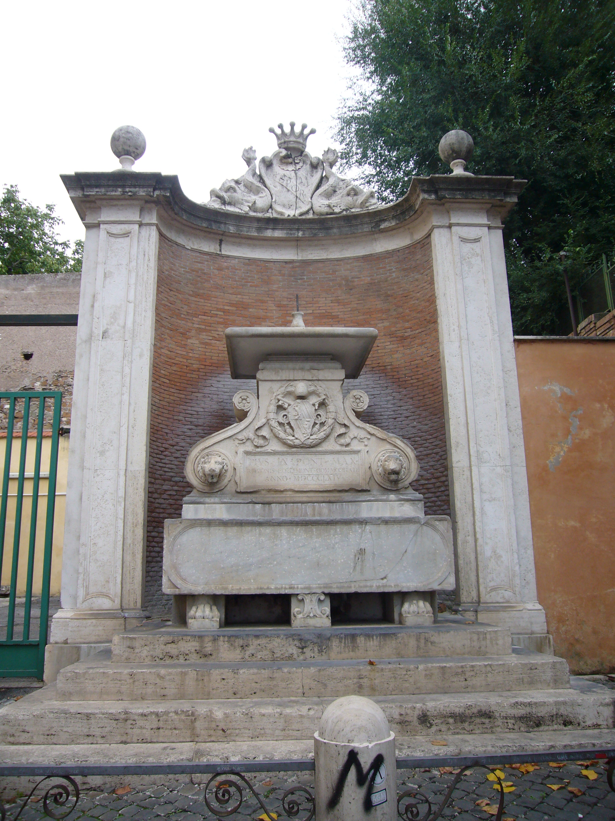 Roma, via Annia, fontana di Pio IX o "Fontana Celimontana". Nell'iscrizione si legge: "PIVS IX PONT MAX / REGIONIS COELIMONT COMMODITATE / ANNO MDCCCLXIV"